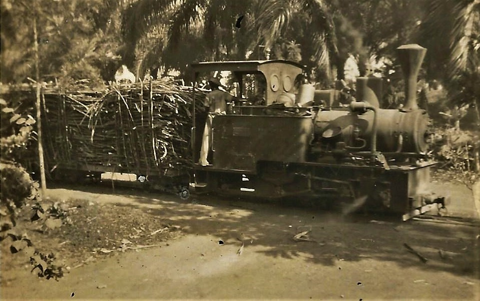 Um comboio de cana na Fazenda Tentativa, propriedade da Companhia do Açúcar de Angola, situada no Caxito (Alto Dande) (Zé Luís. 1942.12.20)